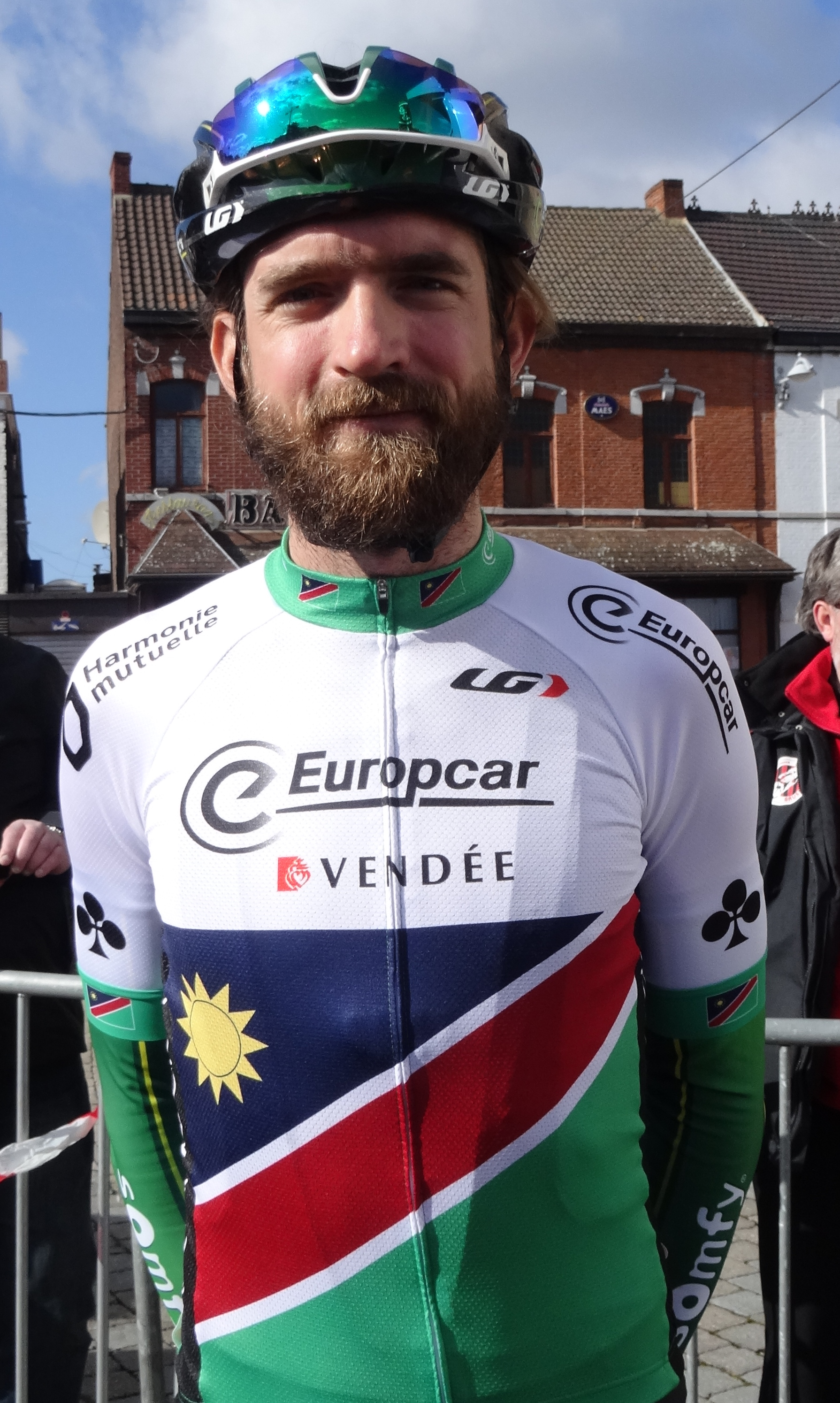 Reportage réalisé le mercredi 4 mars à l'occasion du départ du Samyn des Dames 2015 et du Samyn 2015 à Quaregnon, Belgique.